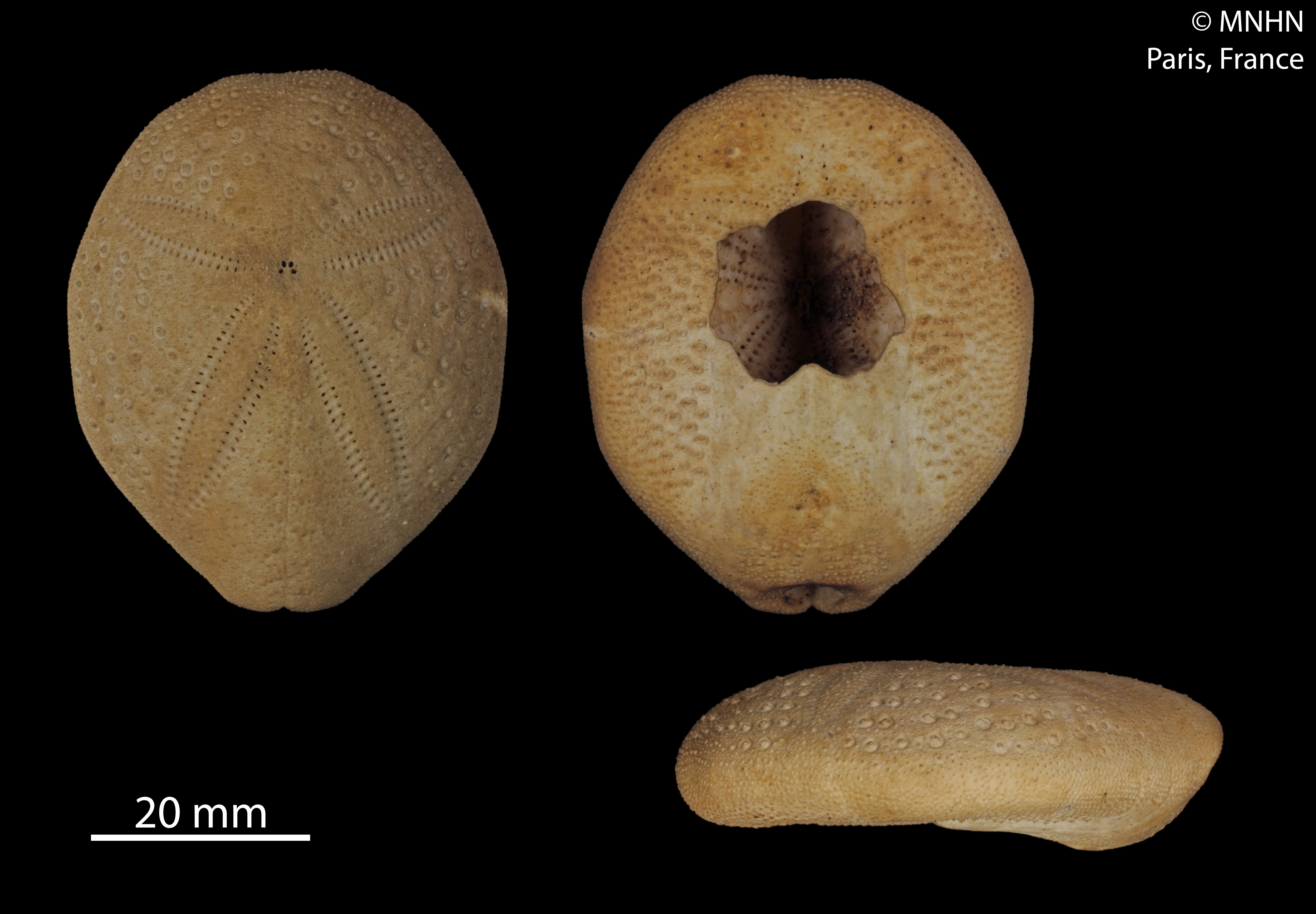 Maretia planulata, collection du Muséum National d'Histoire Naturelle (Paris, France). Origine : Libellé du pays : Mers australes Localité/Lieu-dit : Mers australes Nom du collecteur : Péron & Lesueur Expédition : BAUDIN Navire : Le Géographe et Le Naturaliste Numéro de station : BAUDIN4